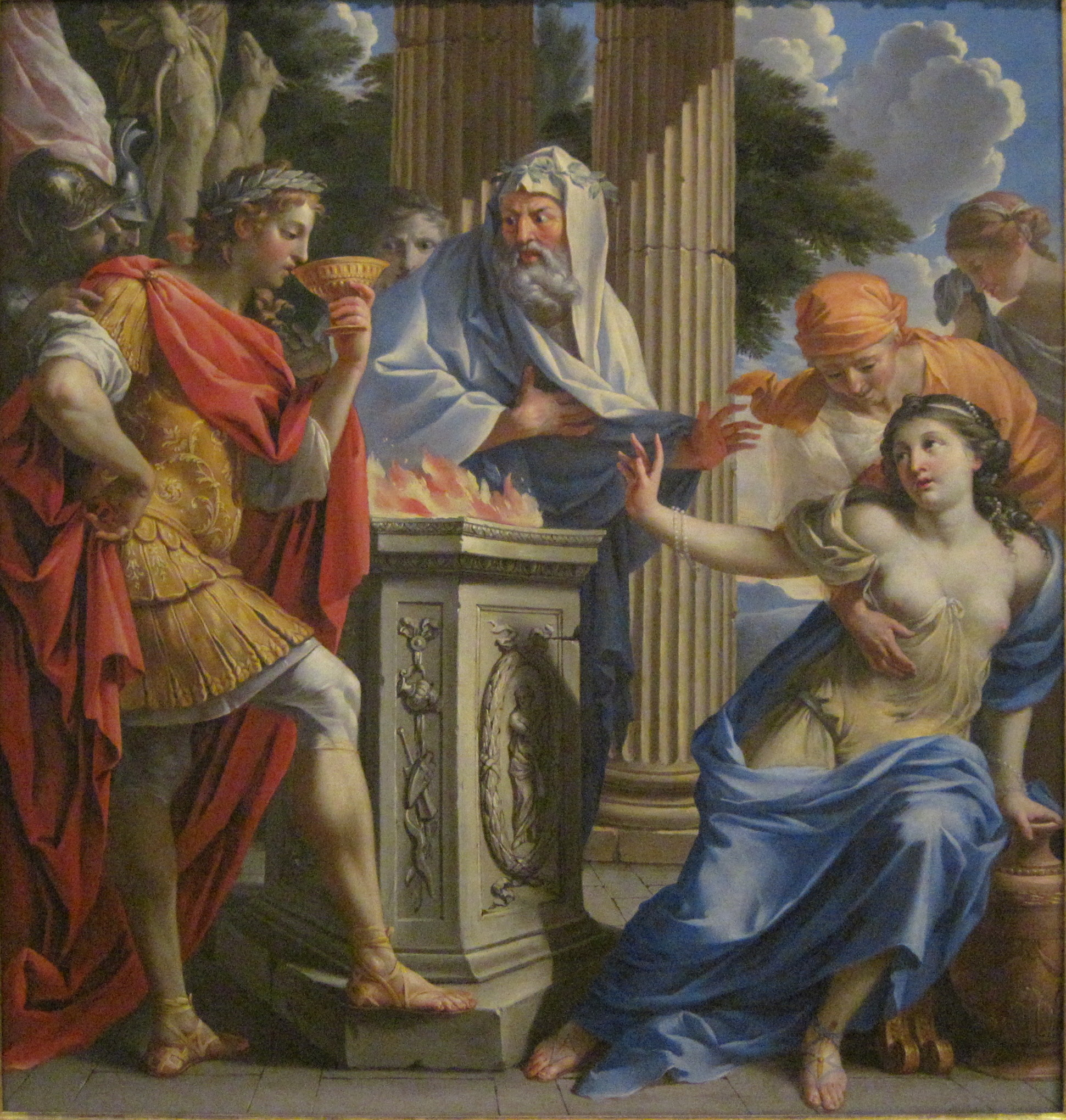 Représentation d'une épisode chez Plutarque. Camma, prêtresse de Diane, refuse de se soumettre aux attentions amoureuses de Synorix. Devant l'autel, elle boit du poison en le faisant en boire aussi.